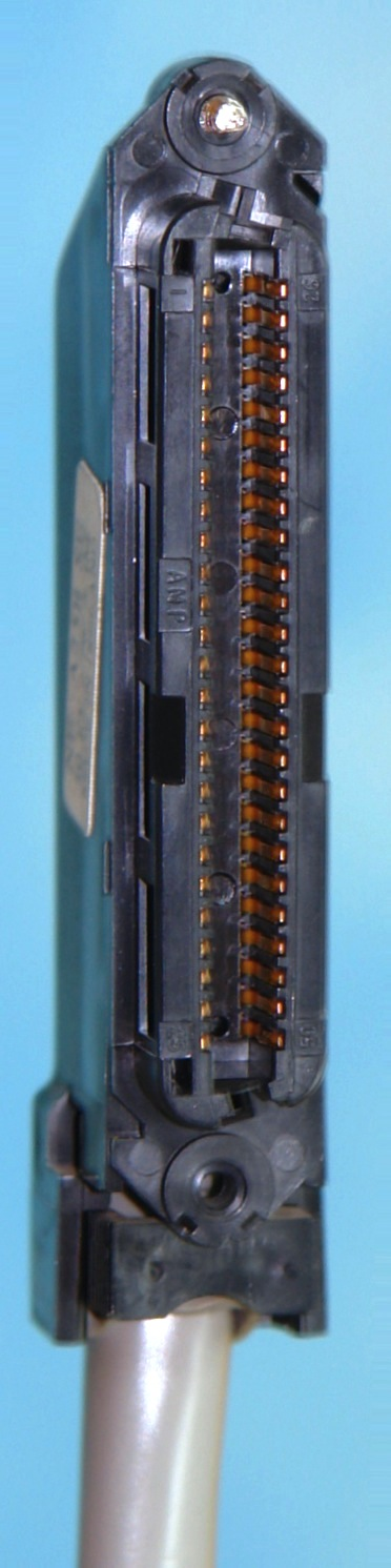 Female RJ21 connector